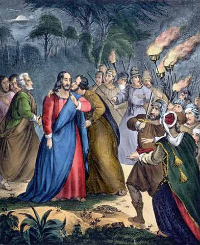 Ilustración